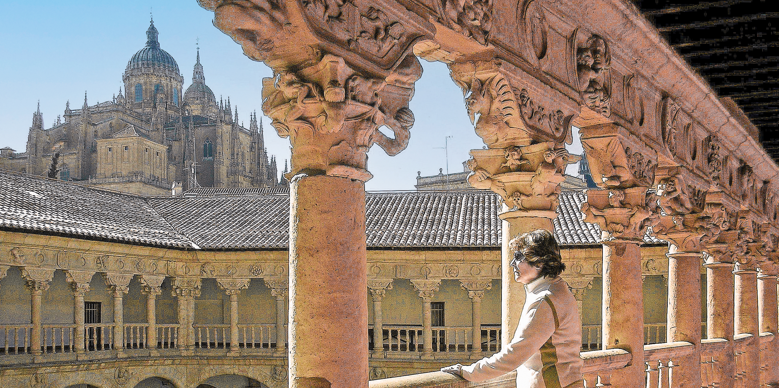 Salamanca es una ciudad monumental